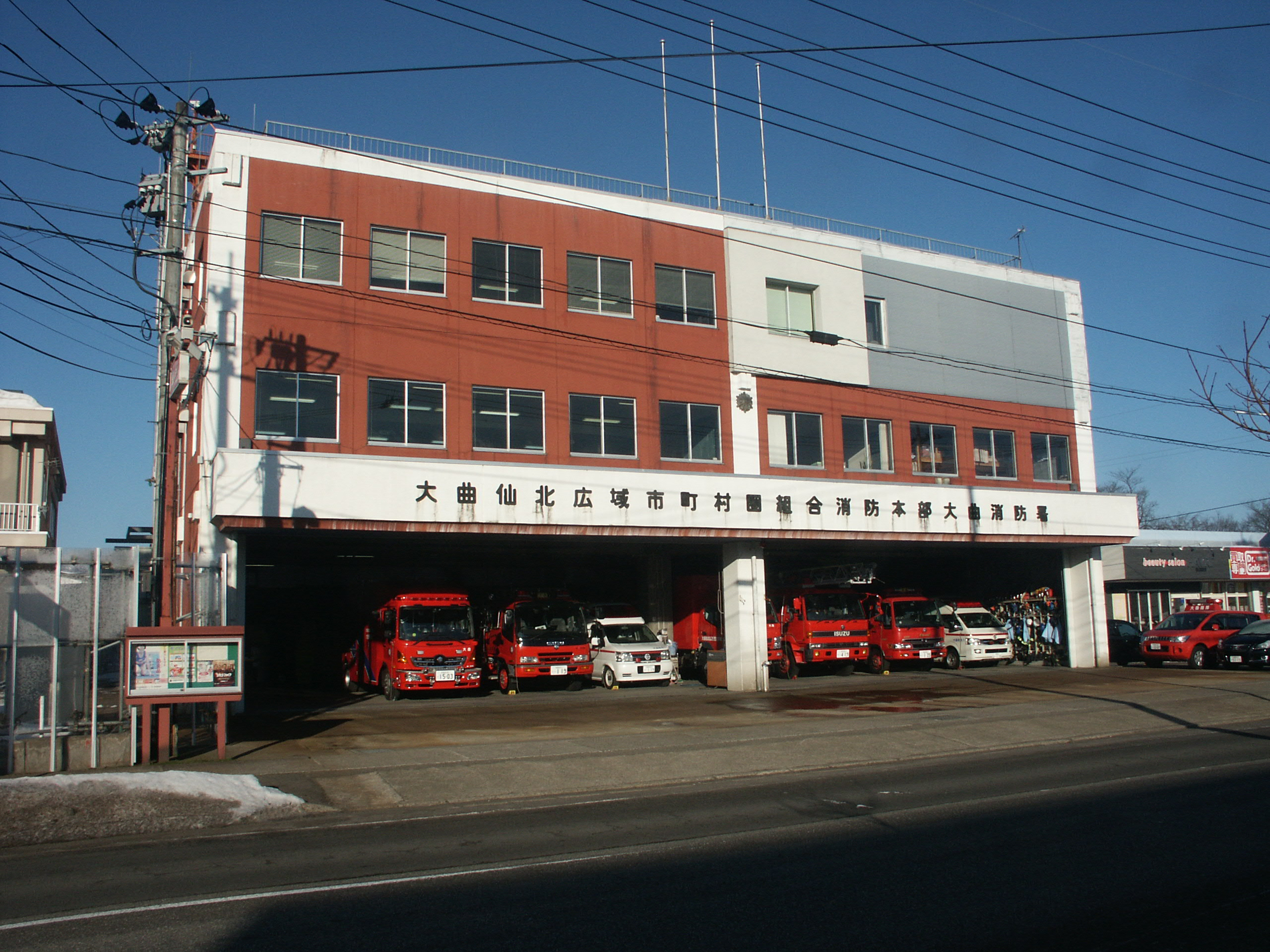 大曲仙北広域消防本部大曲消防署庁舎